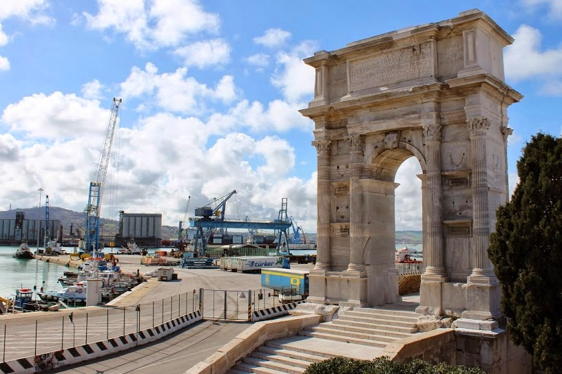 Arco di Traiano This is a photo of a monument which is part of cultural heritage of Italy.